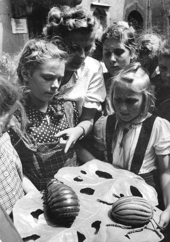 Magdeburg, Unterricht über den Kartoffelkäfer Illus Biscan Gr/We. 7.7.1951 Jugend rüstete zum Kampf gegen den Kartoffelkäfer. In der Magedburger Börde sind bereits vereinzelt Kartoffelkäfer gefunden worden. Vor vierzehn Tagen ist deshalb schon die erste Suchaktion in Magdeburg veranstaltet worden. Das Magdeburger Museum besitzt eine überlebensgrosse Nachbildung des gefährlichen Schädlings, die eine ausgezeichnete Unterrichtshilfe darstellt. - Unser Bild zeigt Schülerinnen der VI b der Friedrich-Naumann-Schule in Magdeburg vor dem riesigen Kartoffelkäfer, Lehrerin Liselotte Herlich erklärt den Mädchen, wie sie den Schädling finden und woran sie ihn erkennen.